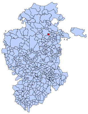 Situación de Navas de Bureba en el mapa de Burgos.